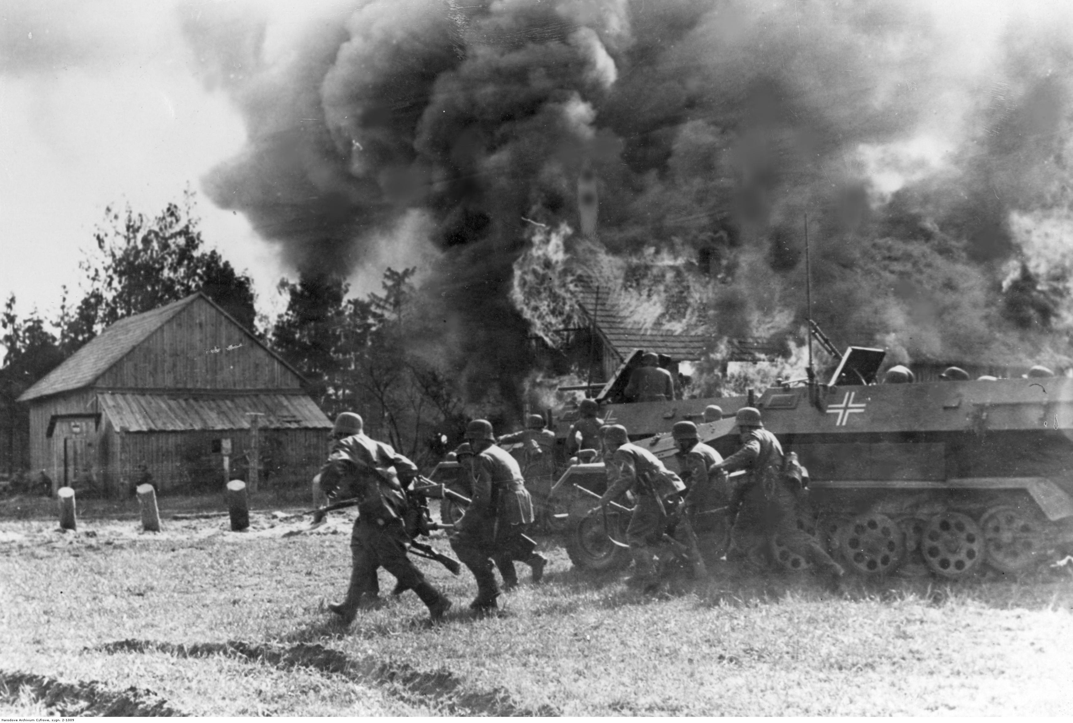 Piechota niemiecka szturmuje płonącą wieś na froncie wschodnim. Widoczne wozy pancerne SdKfz 251/10 Ausf C i SdKfz 251/1 Ausf C i płonące budynki.